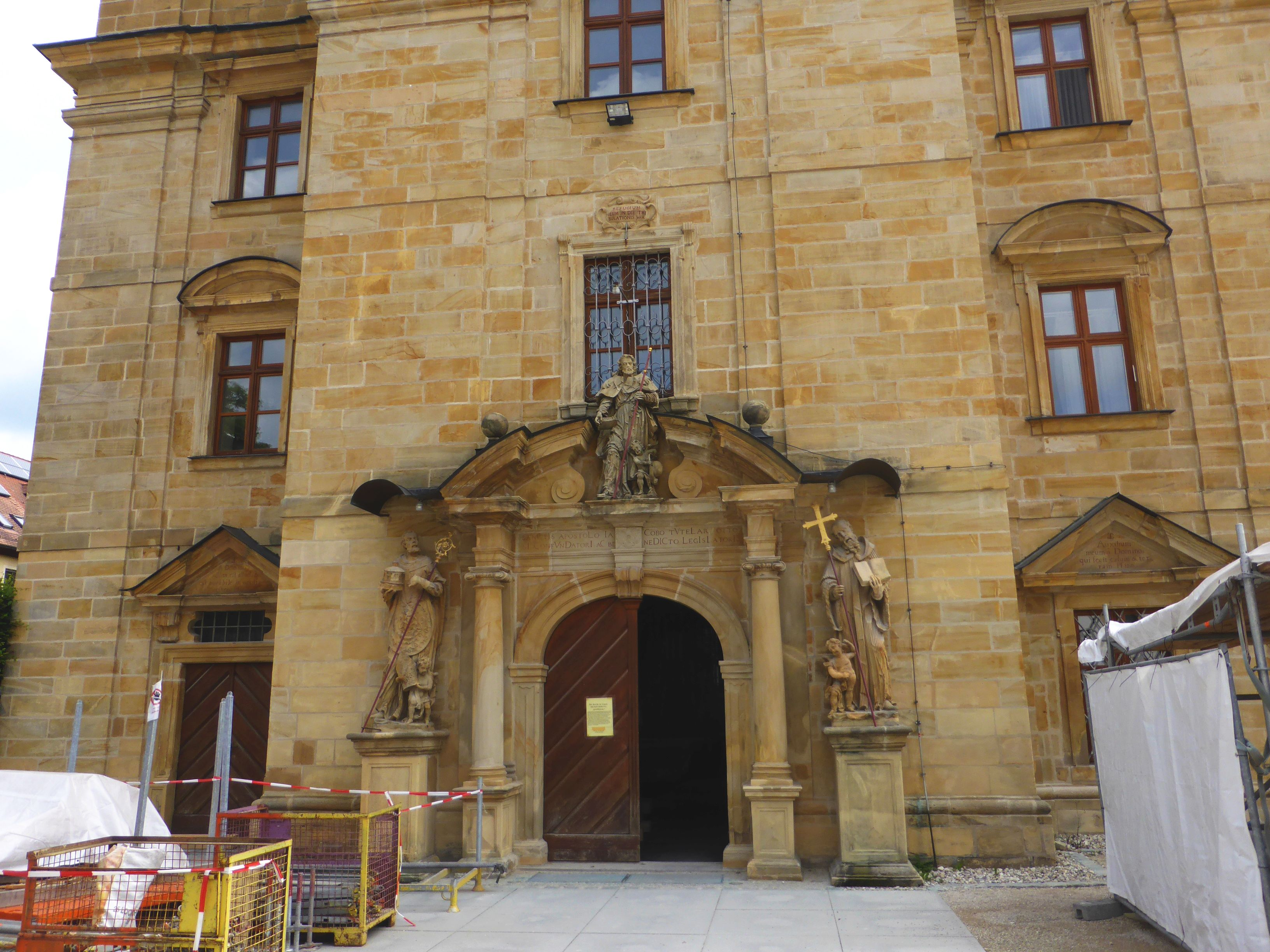 Portal zur Kirche des Kloster St.Jacobus in Ensdorf